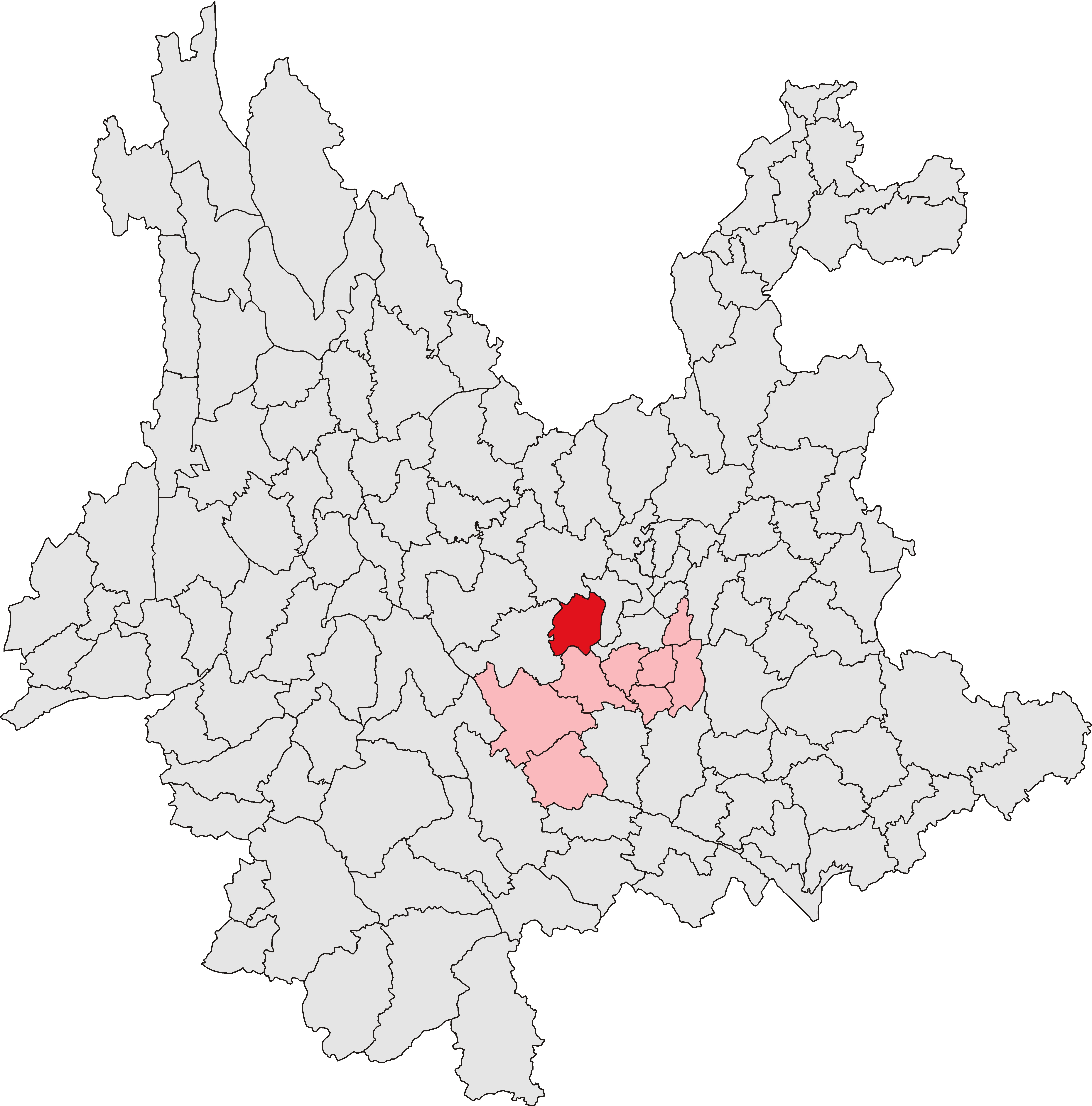 中文（中国大陆）: 易门县位置图